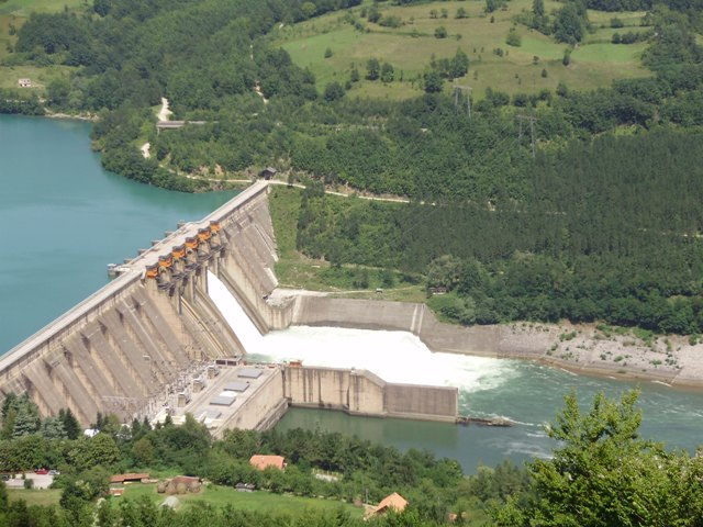 Hidroelektrana,Perucac